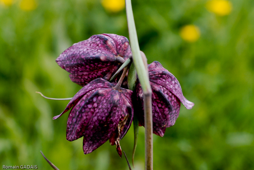 Triple fleur de Fritillaire Pintade (Fritillaria meleagris) prise dans une prairie humide des bords de Sèvre Nantaise (France - 44) par Romain GADAIS photographe naturaliste amateur.